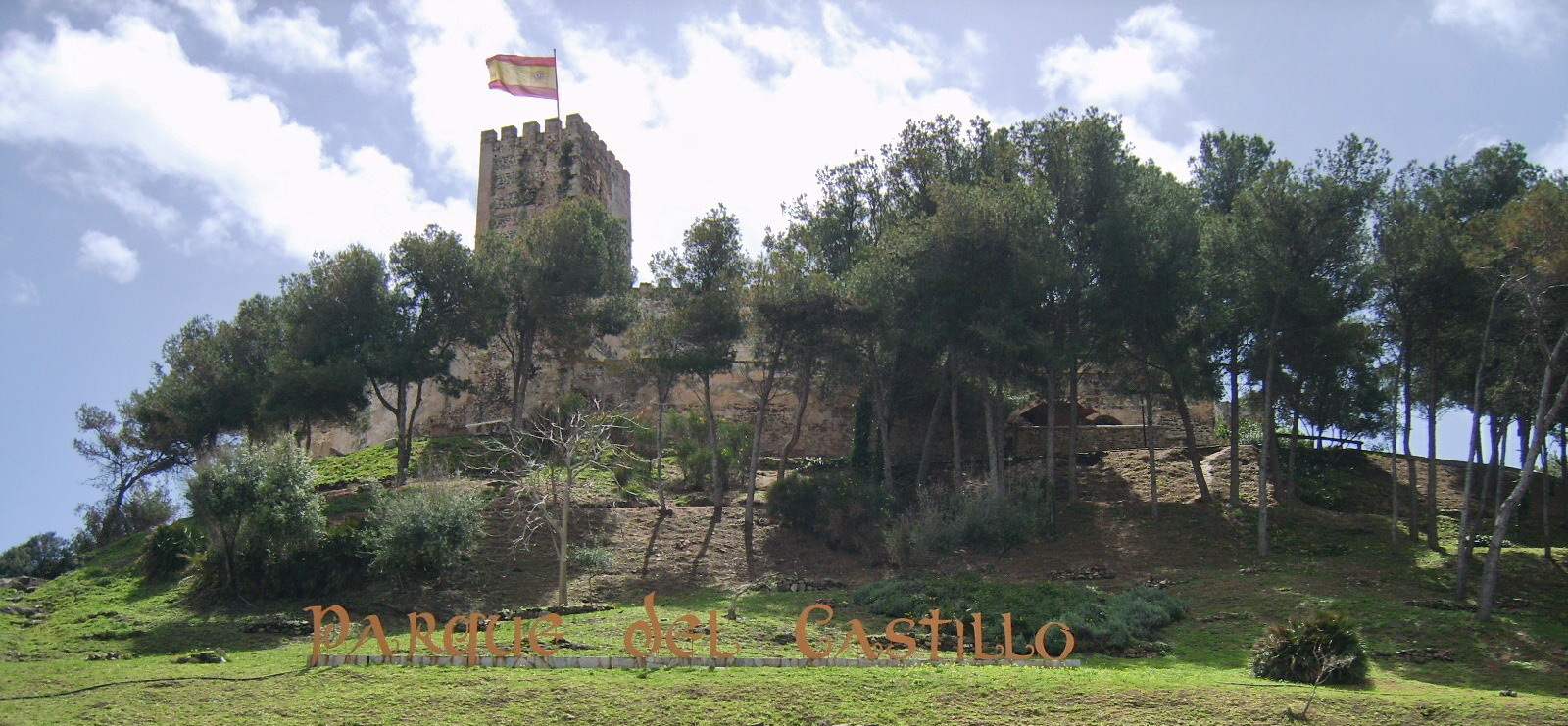 Fuengirola castle